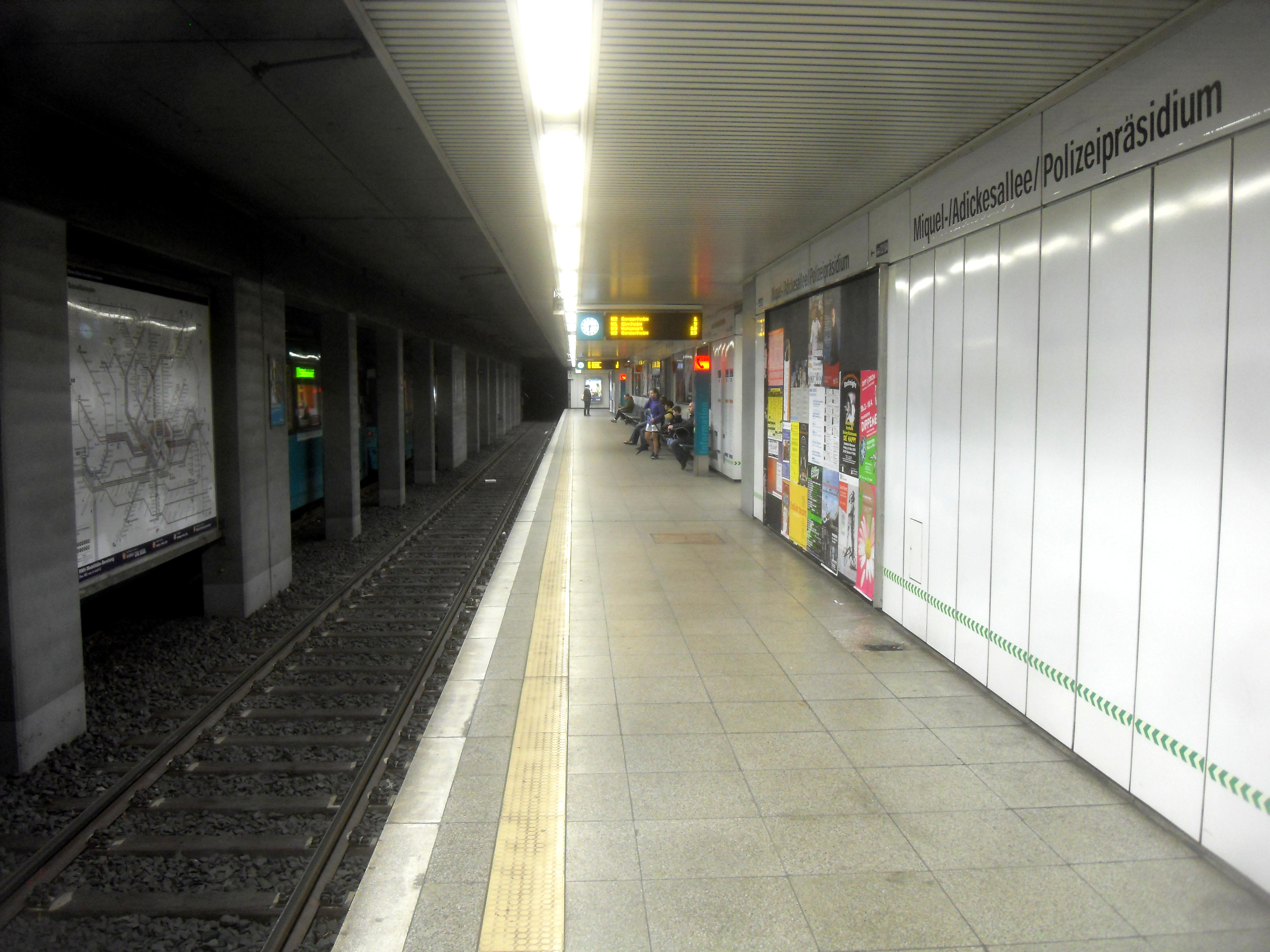 Bahnsteig des U-Bahnhofs Miquel-/Adickesallee (Richtung Ginnheim, Gonzenheim, Hohemark) der U-Bahn Frankfurt auf den Linien U 1 bis U 3 in Hessen (Deutschland)